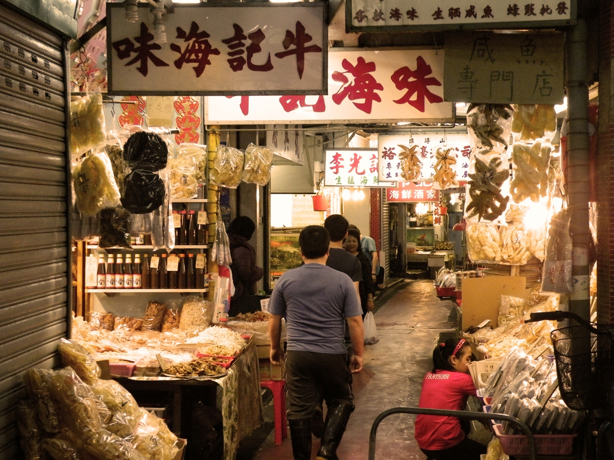 Lau Fau Shan Main Street